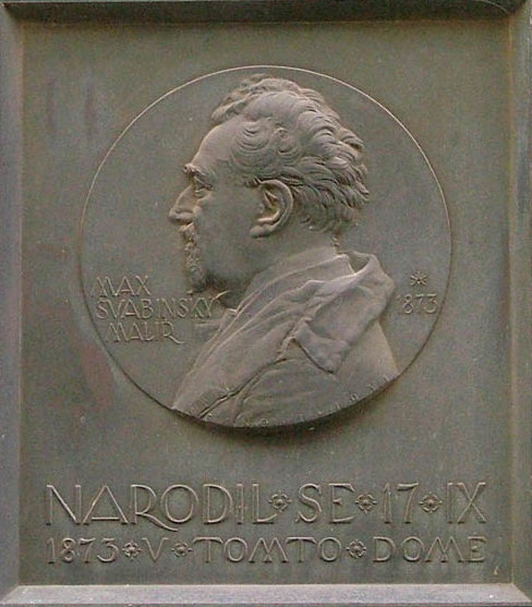 Pamětní deska na rodném domě Maxe Švabinského, Kroměříž Janská 15